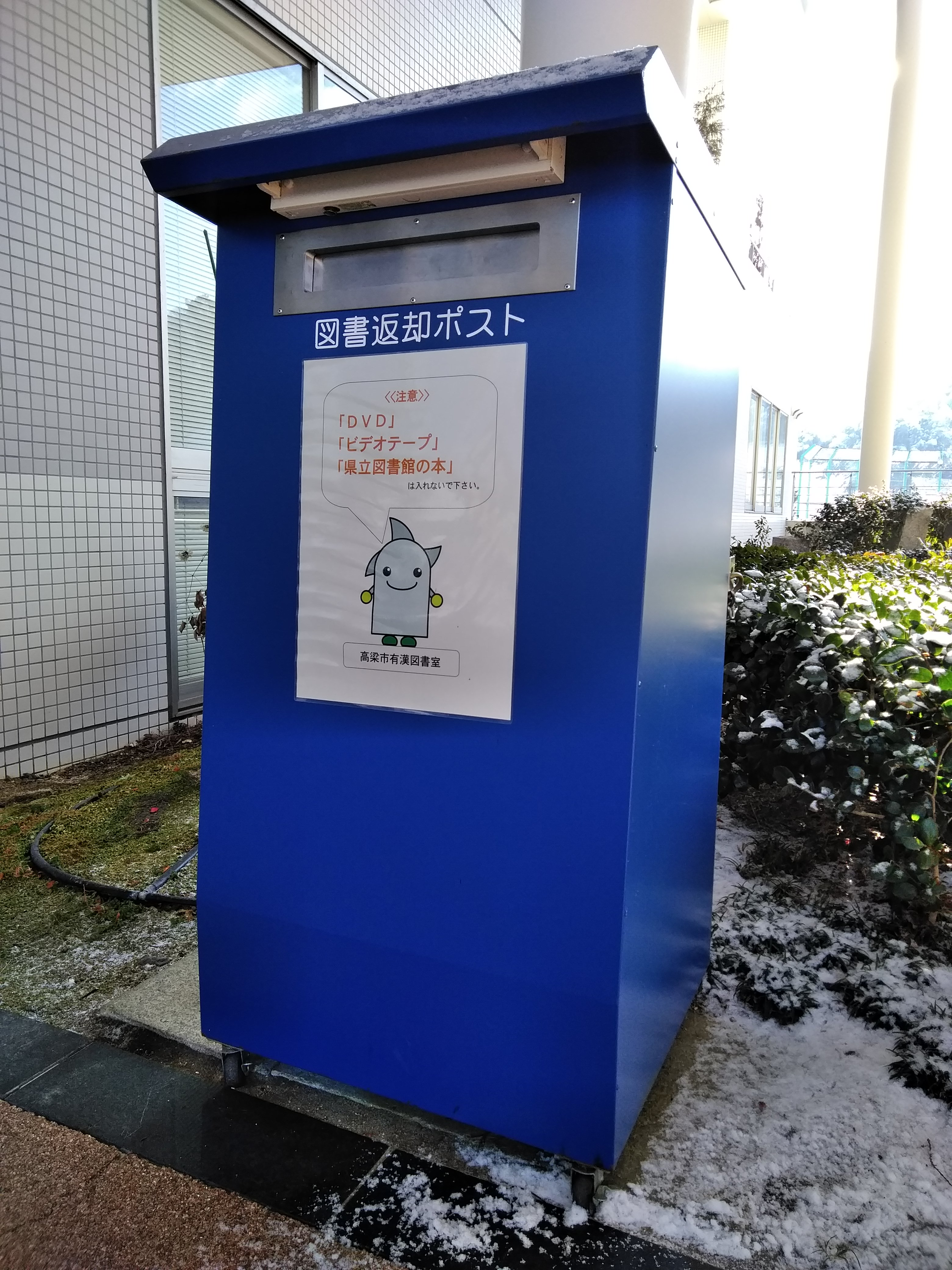 高梁市有漢図書室の図書返却ポスト